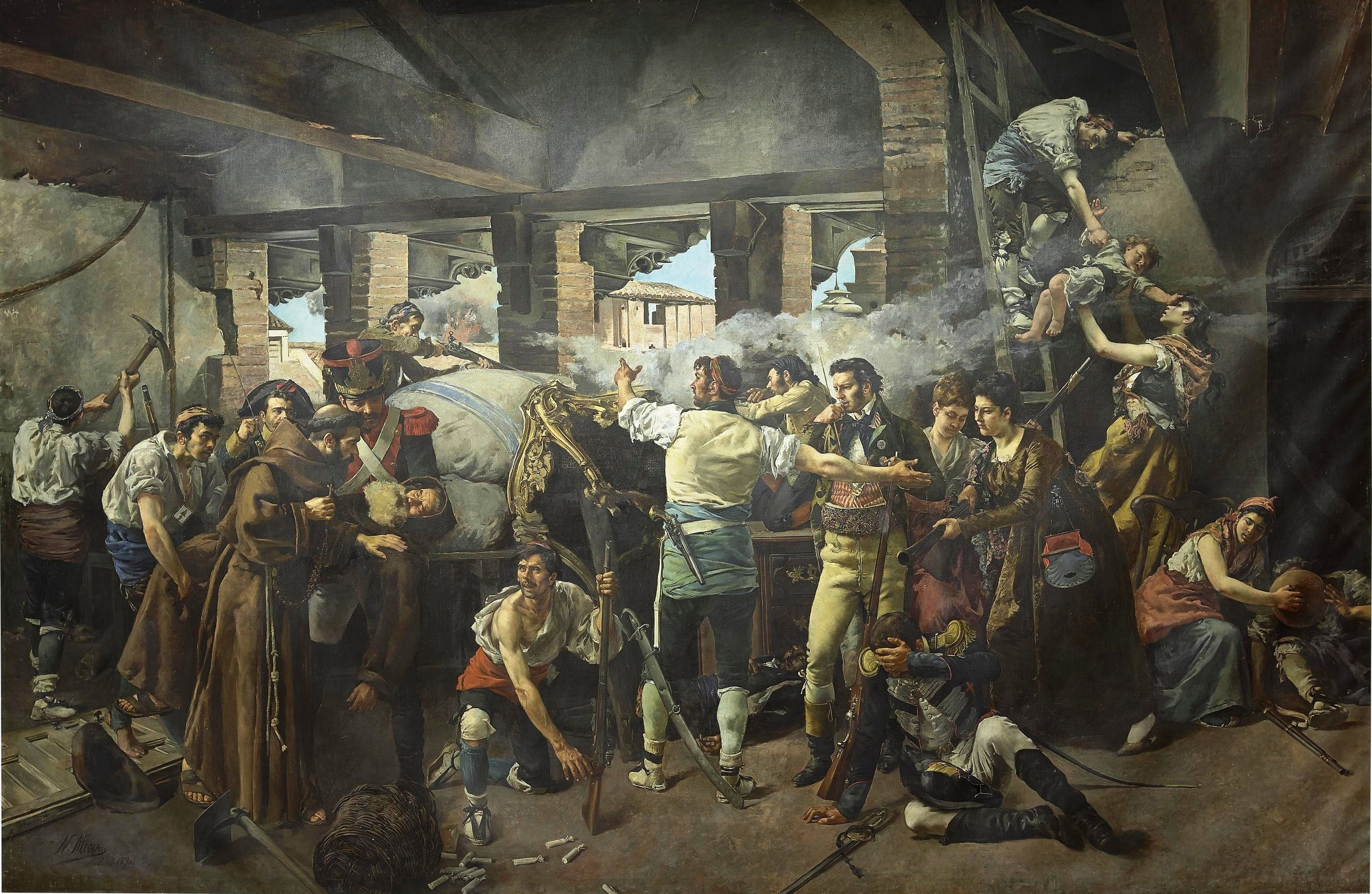 La obra representa a un grupo de españoles defendiendo el convento de Santa Engracia de Zaragoza de los ataques del ejército francés durante la Guerra de la Independencia Española, que se libró entre 1808 y 1814.